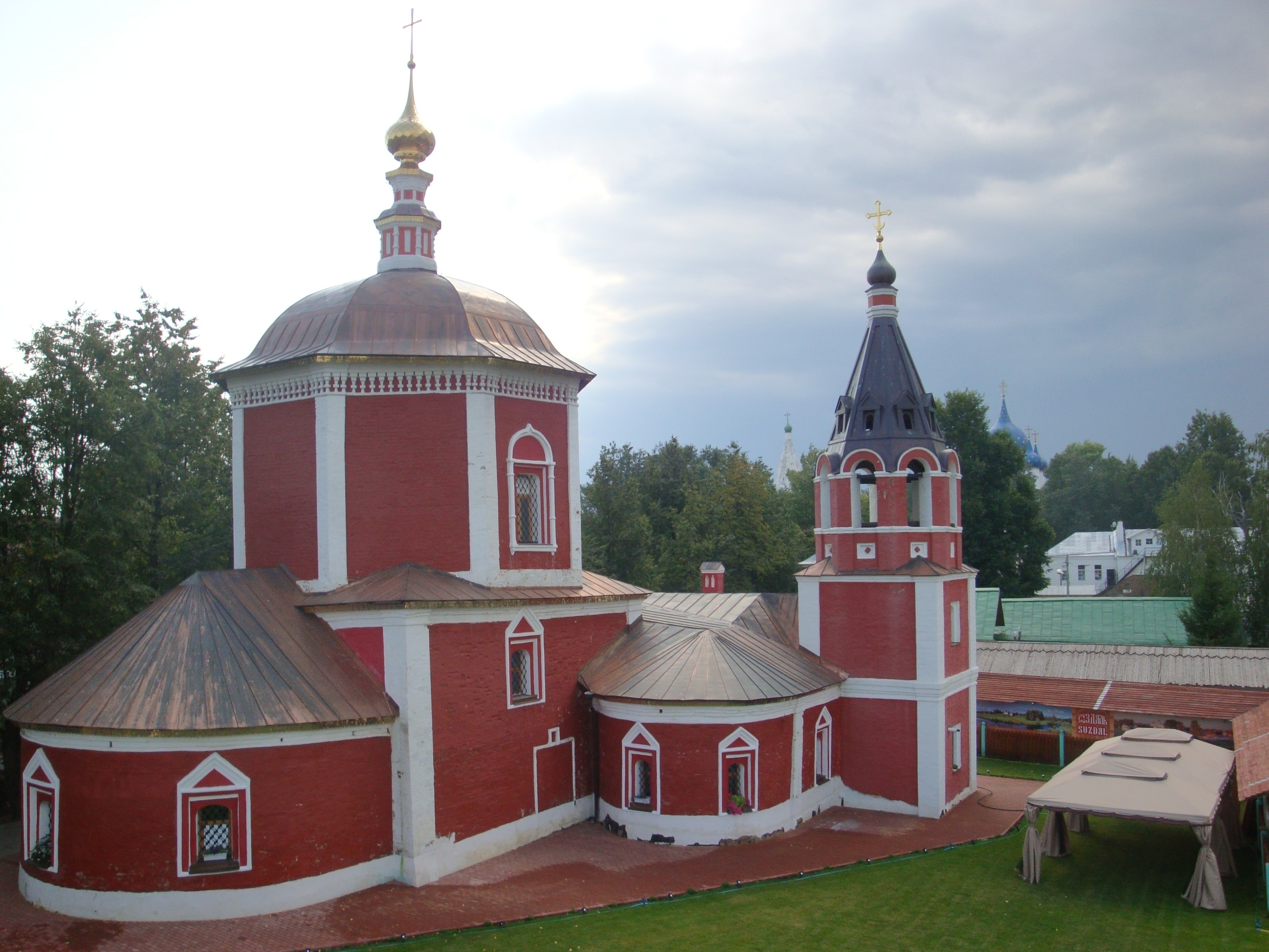 Церковь Успения Пресвятой Богородицы (церковь Успенская) (Владимирская область, Суздаль, Кремлевская улица)